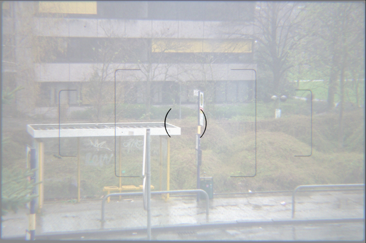 Markierung des Spotbelichtungsmeßfelds im Sucher einer digitalen Spiegelreflexkamera (Pentax *istds). Markierung per nachträglicher Bildbearbeitung hervorgehoben. Aufnahme durch den Sucher der Kamera mit einer Ricoh Caplio GX angefertigt